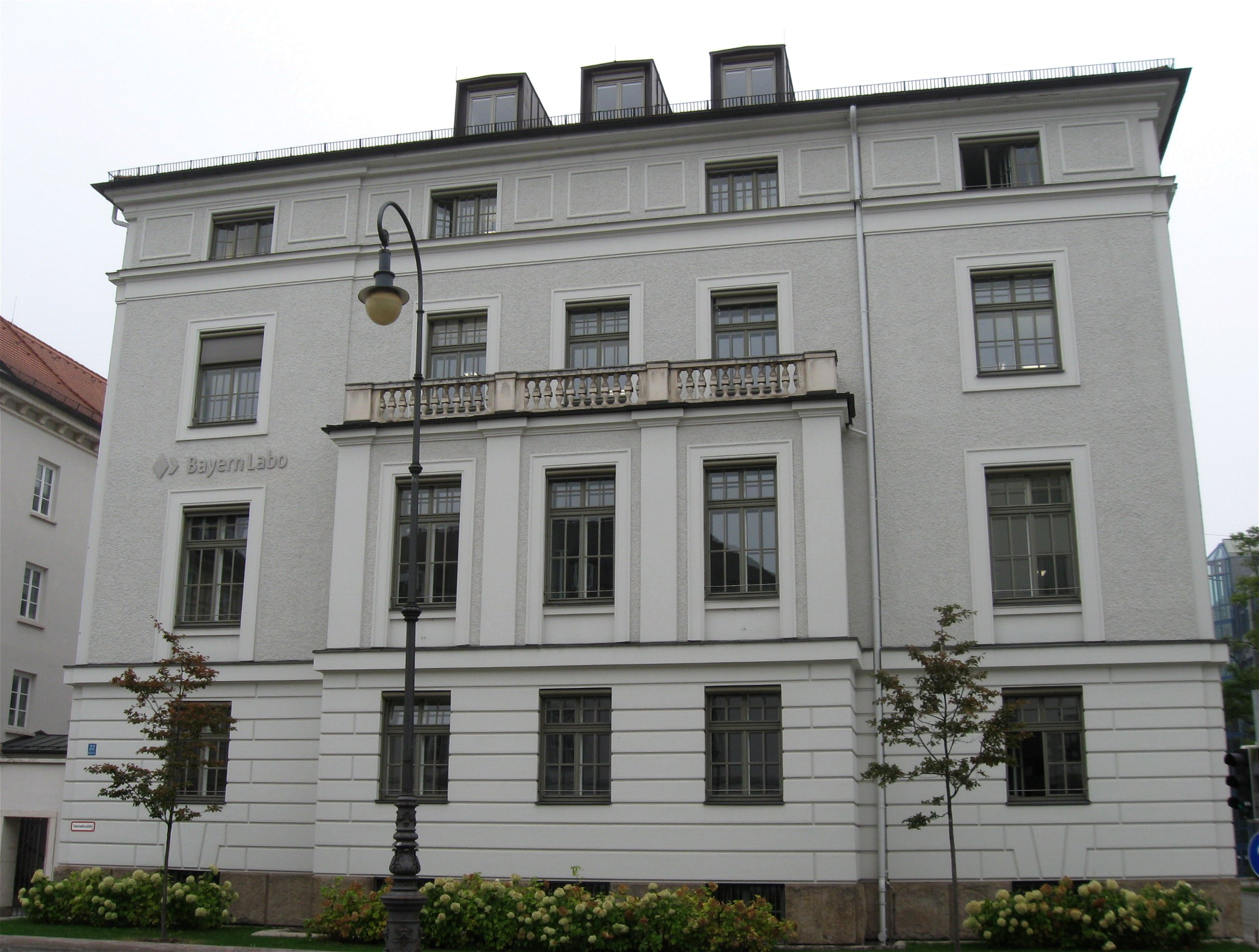 Brienner Straße 22; Palais Berchem, jetzt Verwaltungsgebäude der Bayerischen Landesbank, 1897–98 von Gabriel von Seidl; vereinfachte Wiederherstellung nach Kriegsschäden; Treppenhaus mit Stuckdekor erhalten; 1927 und 1933 erweitert.